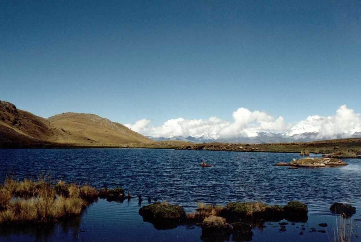 Se encuentra en el piso jalca de Casca, frente a la Cordillera Blanca. Habitad de algunos pajarillos de la zona